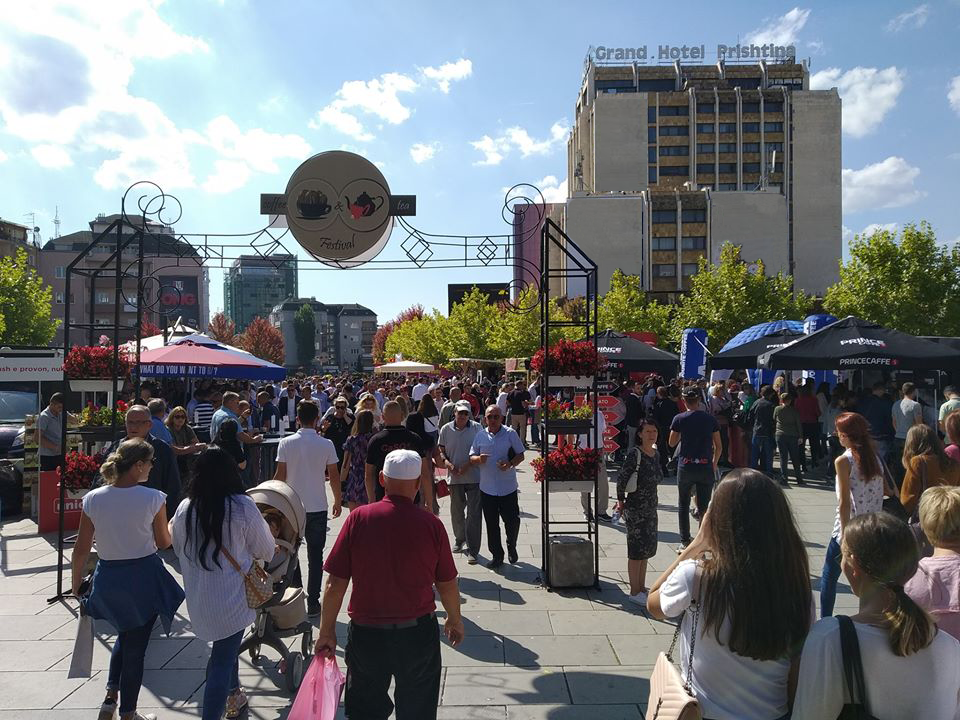 Cofee and Tea Festival - Prishtine